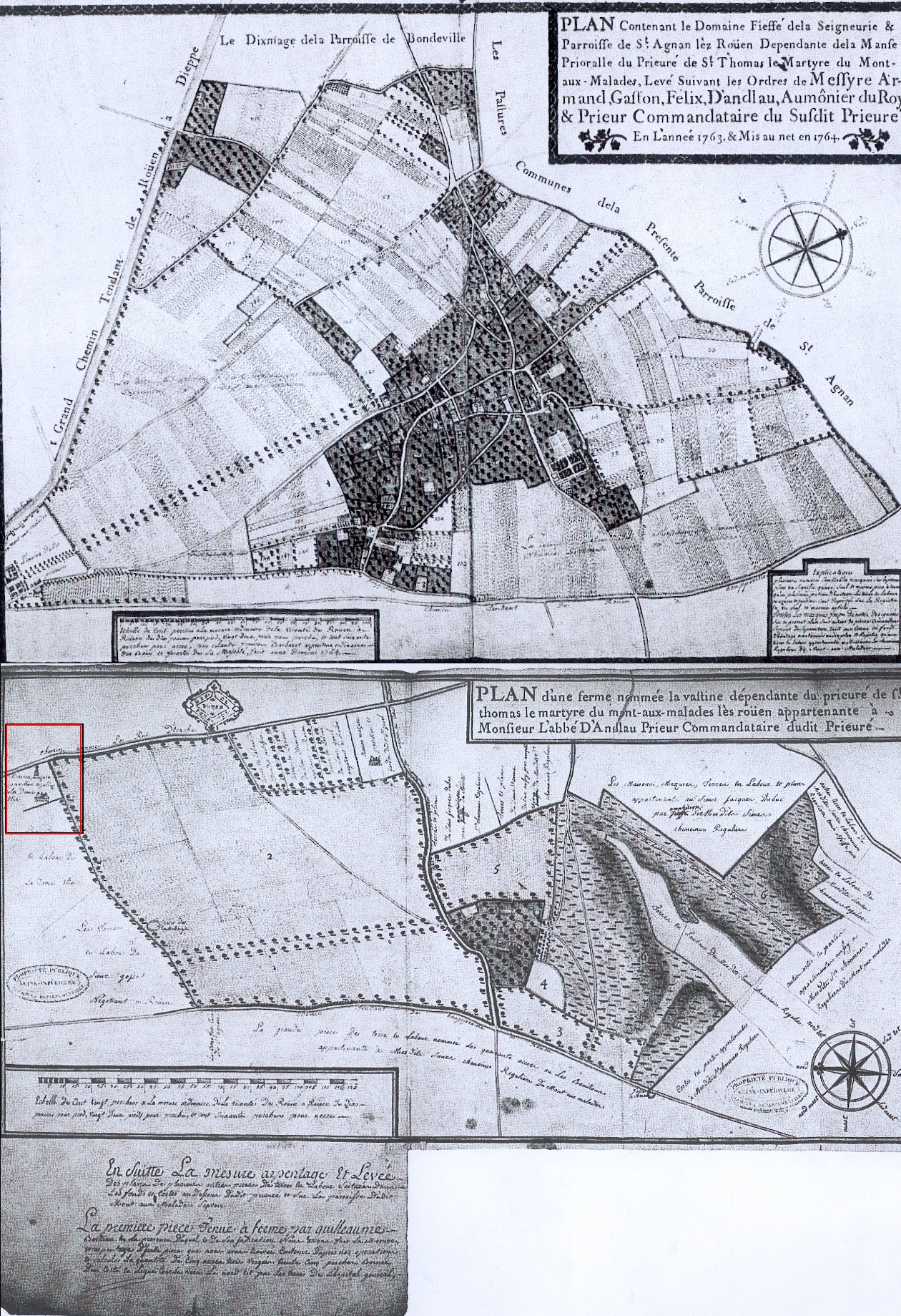 il s'agit d'un plan trouvé aux archives datant de 1764, La première page (plan du haut) correspond au village de Saint-Aignant, La seconde page (plan du bas) retrace le plan d'occupation des sols de la ferme de la Vatine-Bouillons